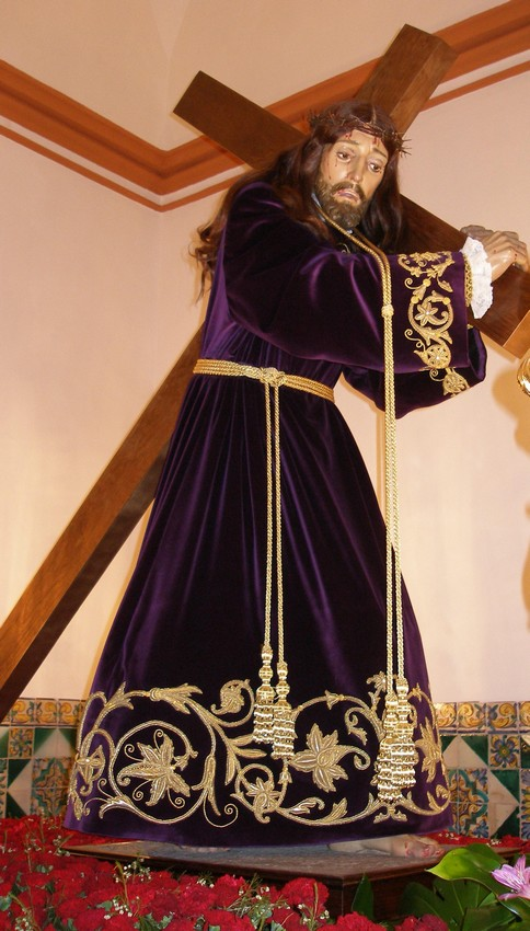 Paso de Jesús Nazareno, imagen titular de la Hermandad.